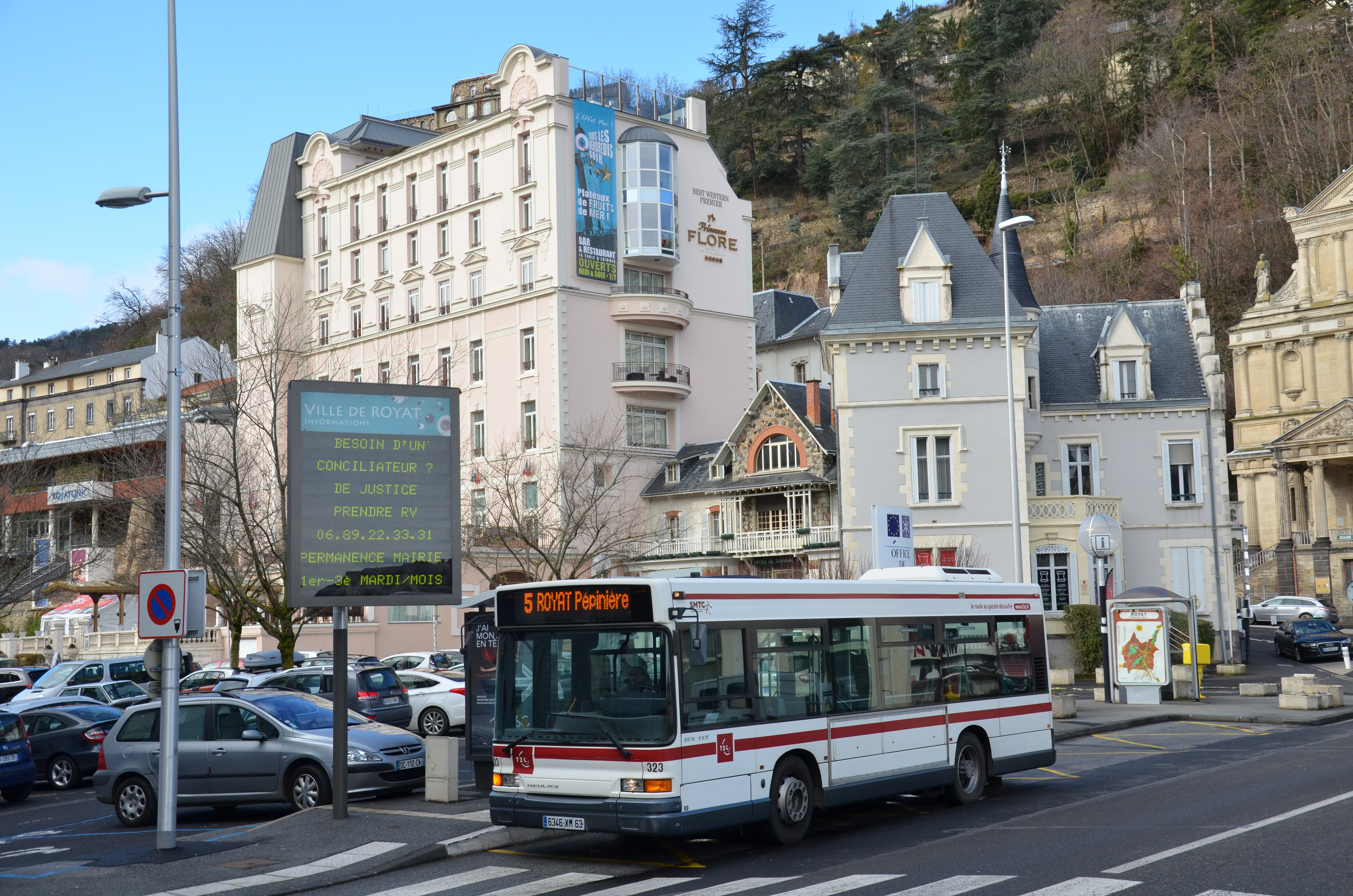 Heuliez GX 117 n°323 de la ligne 5 du réseau T2C de Clermont-Ferrand, à Royat Place Allard.